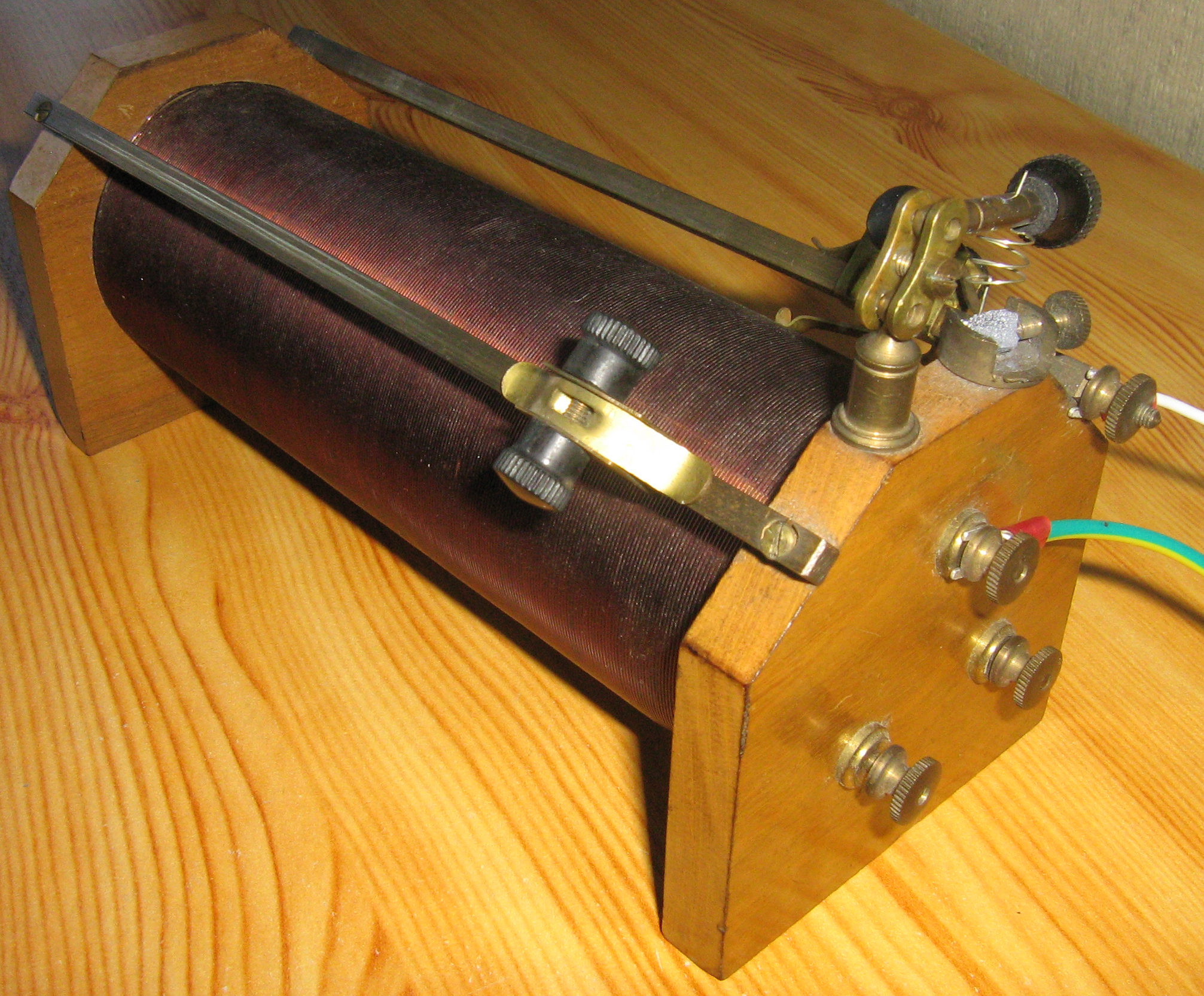 Poste a galène Oudin pour l'écoute de la bande 100 kHz à 6 MHz (45 à 3000 mètres). Le poste Oudin est plus pour l'écoute ordinaire, utilisable par le grand public, une plus grande puissance du circuit d'accord inductance-condensateur arrive a l'écouteur, d’une utilisation très simple, aussi peu coûteux que possible, destiné uniquement pour la radiodiffusion des grandes ondes (GO ou LW), de la radiodiffusion des petites ondes (PO ou MW), si l'on dispose d'une antenne radioélectrique suffisamment développée, la réception nocturne des grands postes européens est possible (portée jusqu’à 2000 km). Le poste Oudin est le plus facile à construire. Le poste Oudin ne permet plus l’écoute de la radiodiffusion dans les bandes décamétrique ou les signaux de dix, quinze, vingt postes d’émission sont perçu au même instant sur le même réglage.